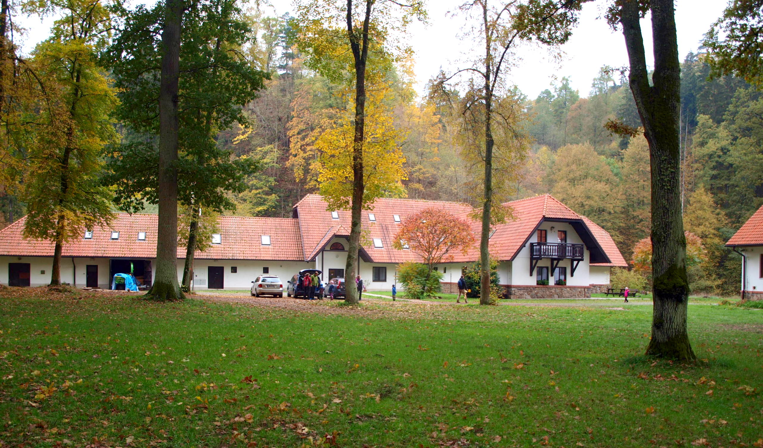 Příběnice, rekreační středisko